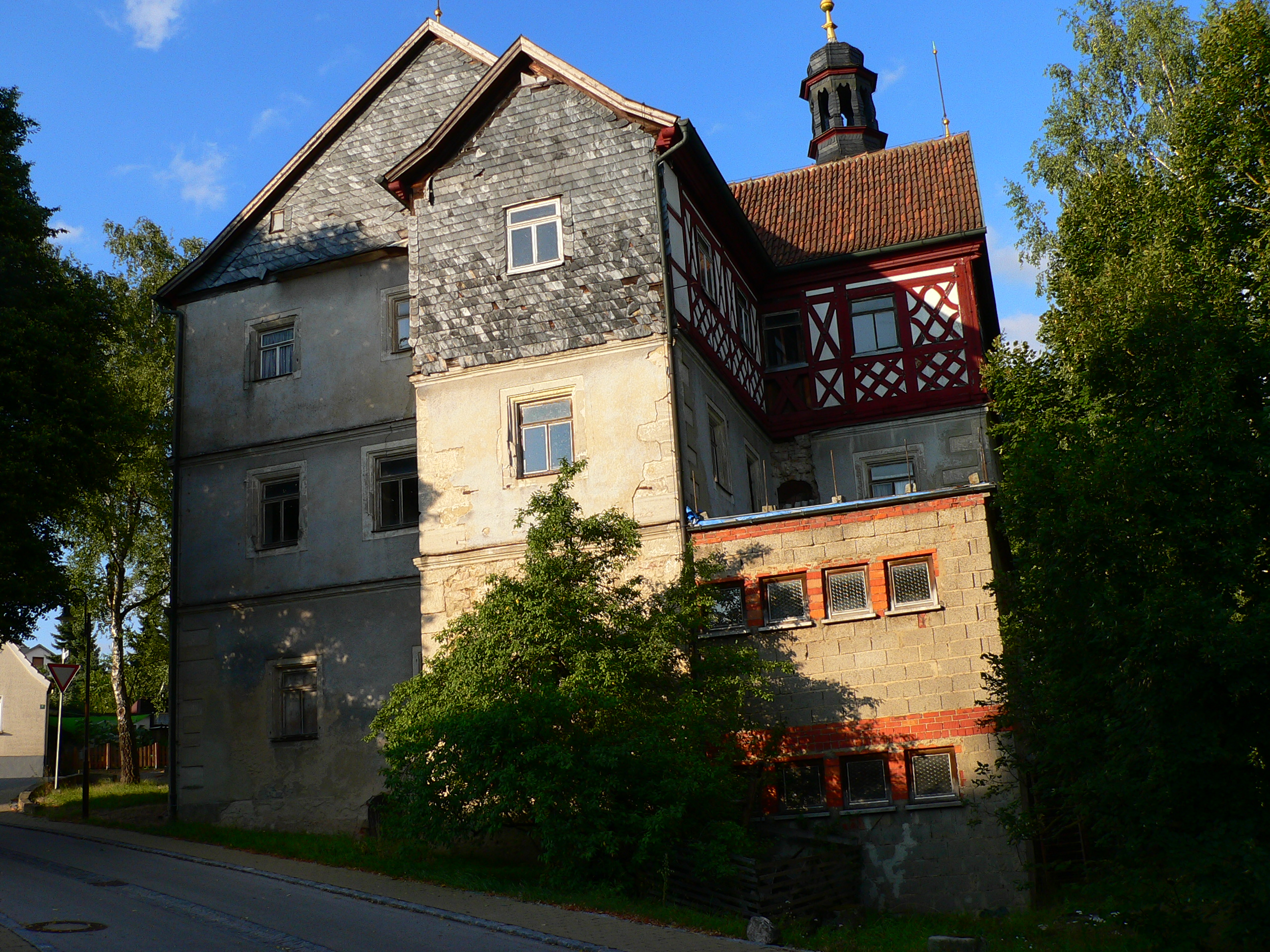 Oberes Schloss in Untersiemau, Kreis Coburg, Bayern